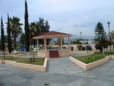 Plaza de la Colonia Villa de Cazarez ubicada en la entrada a la Ciudad.